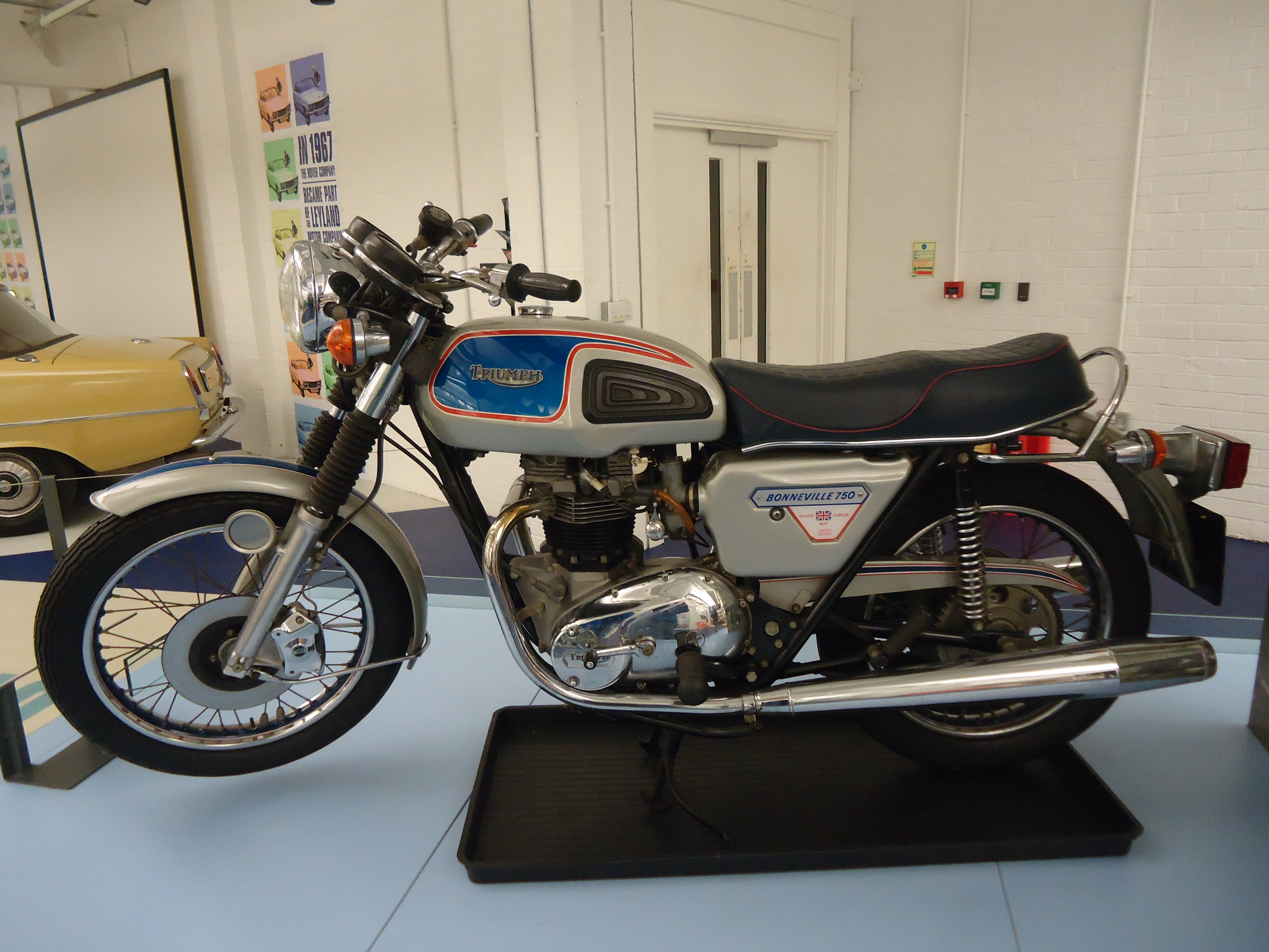 Museo del Transporte de Coventry